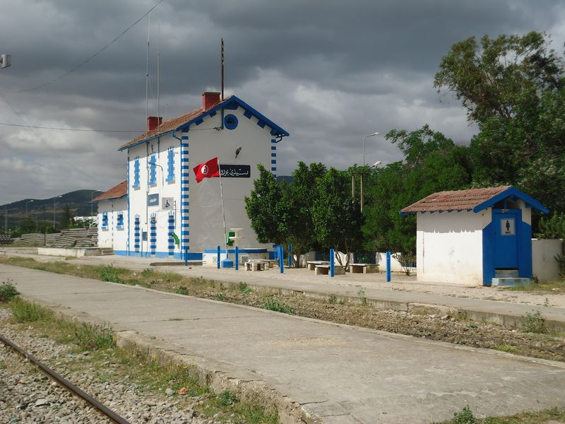 Gare de Bou Rouis en 2014